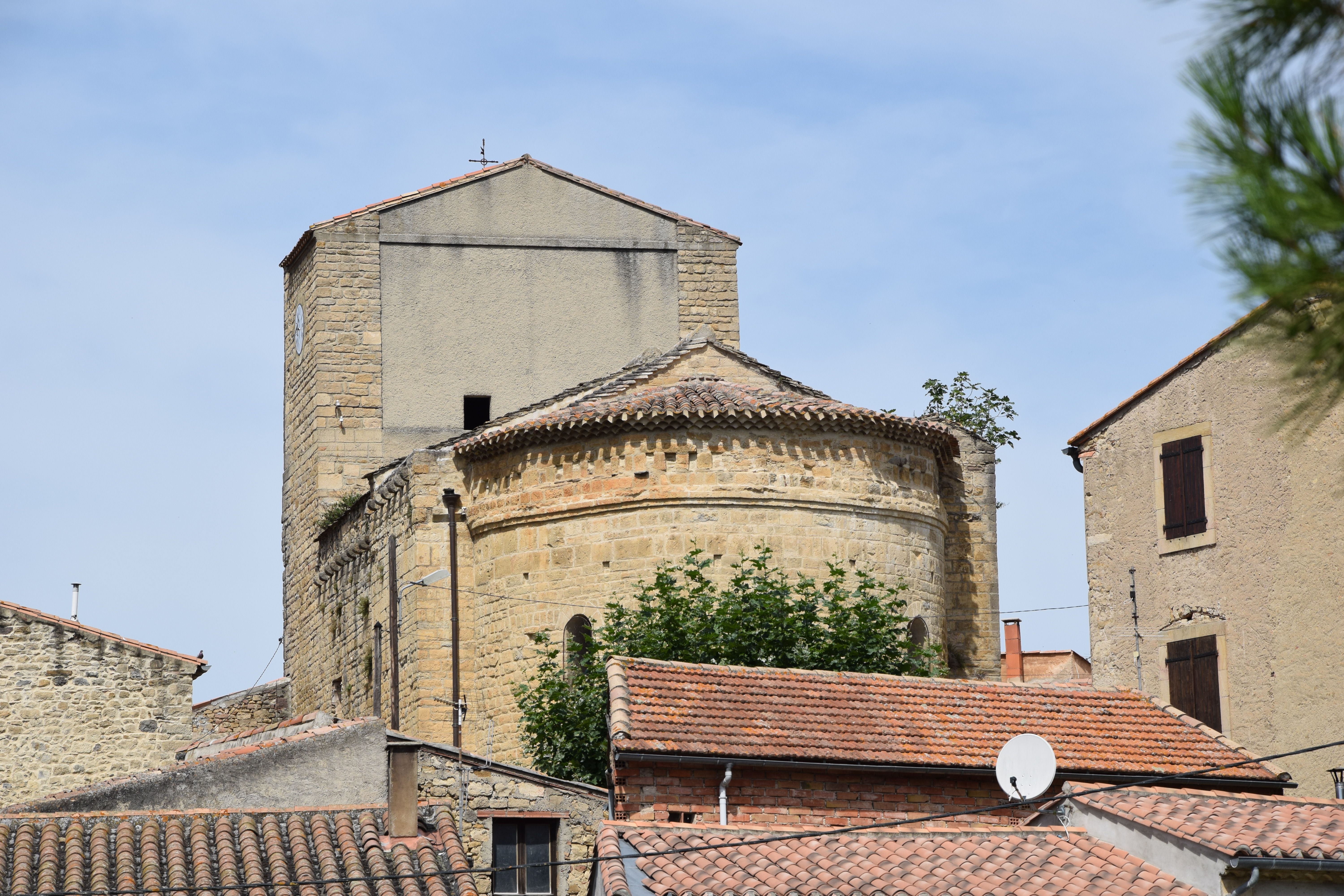 Église Saint-André à Antugnac .